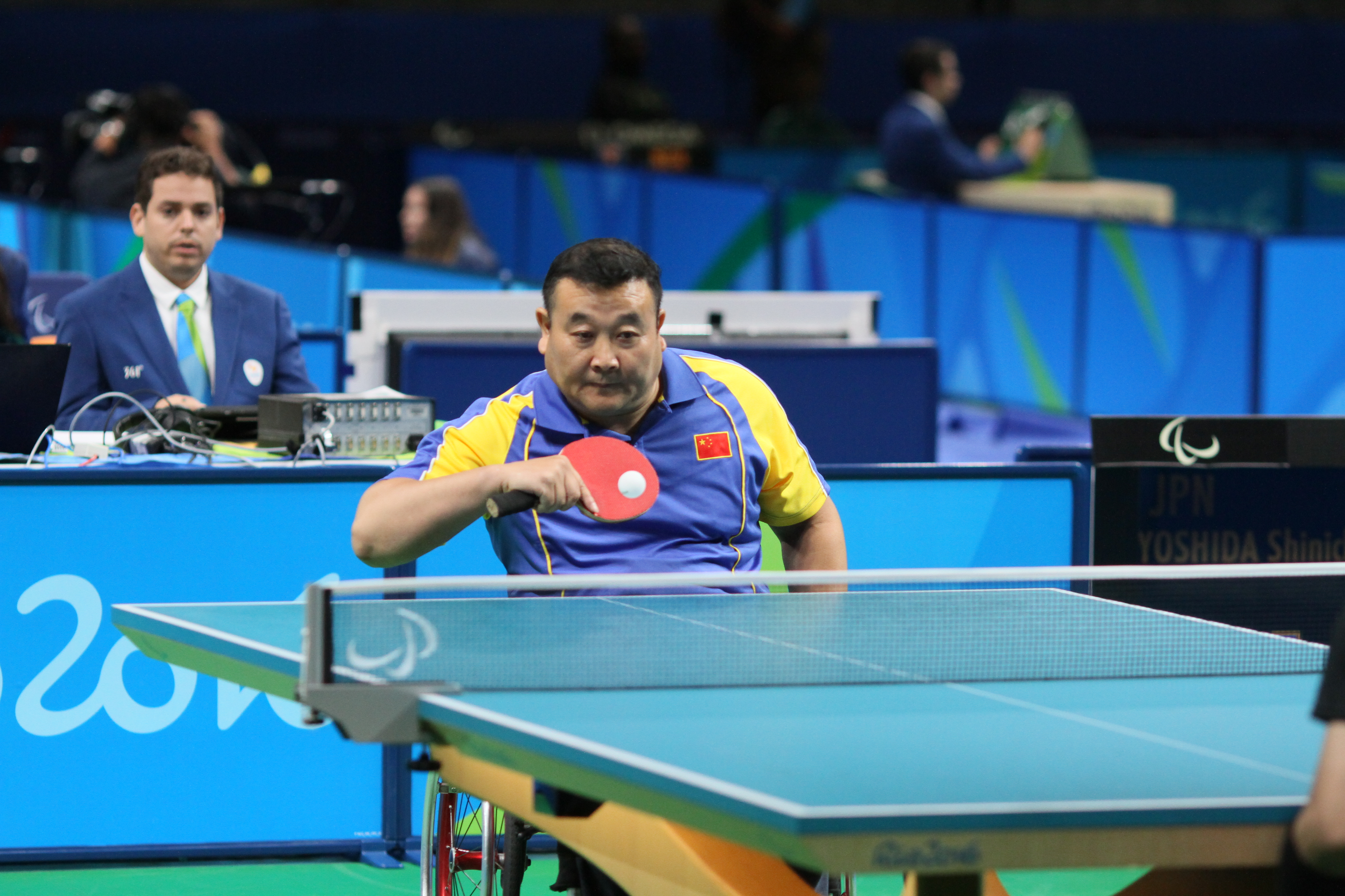 ZHAO Ping (CHN,M3) IMG_4923